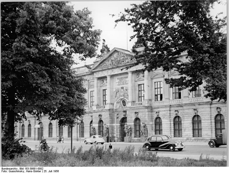 ADN-ZB / Quaschinsky / 25.7.1956 / Berlin Durchblick auf den Eingang des ehemaligen Zeughauses in der Strasse Unter den Linden. Es ist heute Museum für Deutschen Geschichte.